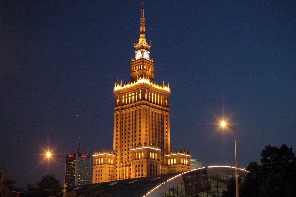 Warszawa's landmark by night